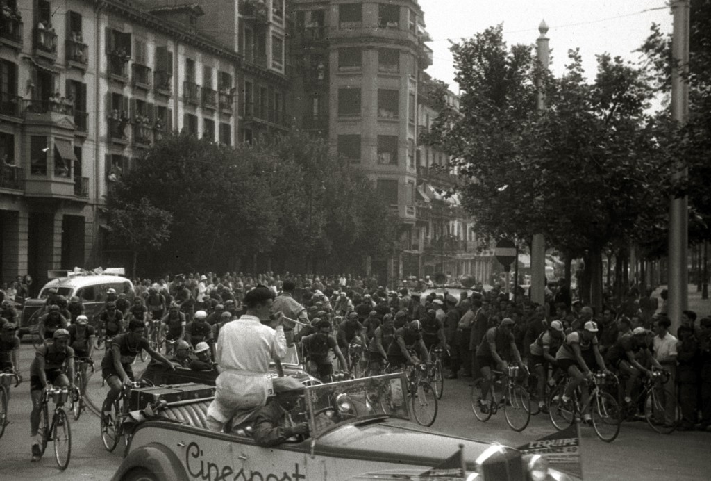 Título original: Ciclismo. Tour de Francia. Julio de 1949 (19/20) Localización: Guipúzcoa